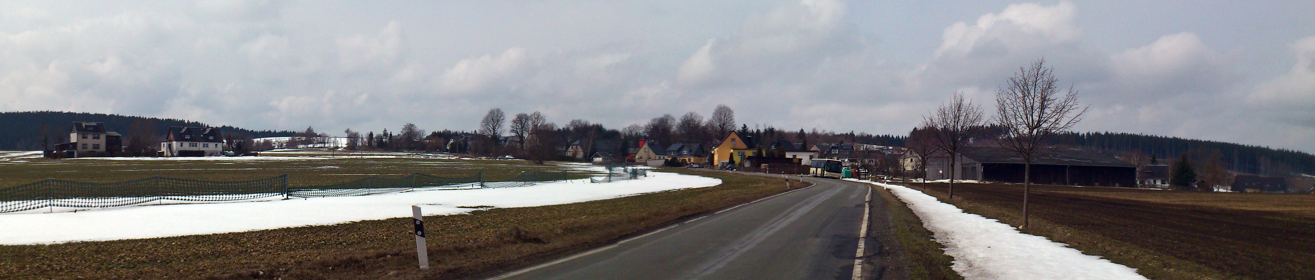 Kießling (Gemeinde Harra), Ansicht von Südosten